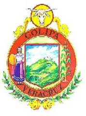 Al centro del escudo se puede observar el "Cerrito del Amor", lugar turístico con su sinuoso camino que justifica la etimología anterior. En la parte superior se encuentra una cabeza de ganado, símbolo de que la ganadería ha sido una de las principales actividades económicas del municipio. Al lado derecho vemos una "milpa", representando la agricultura.